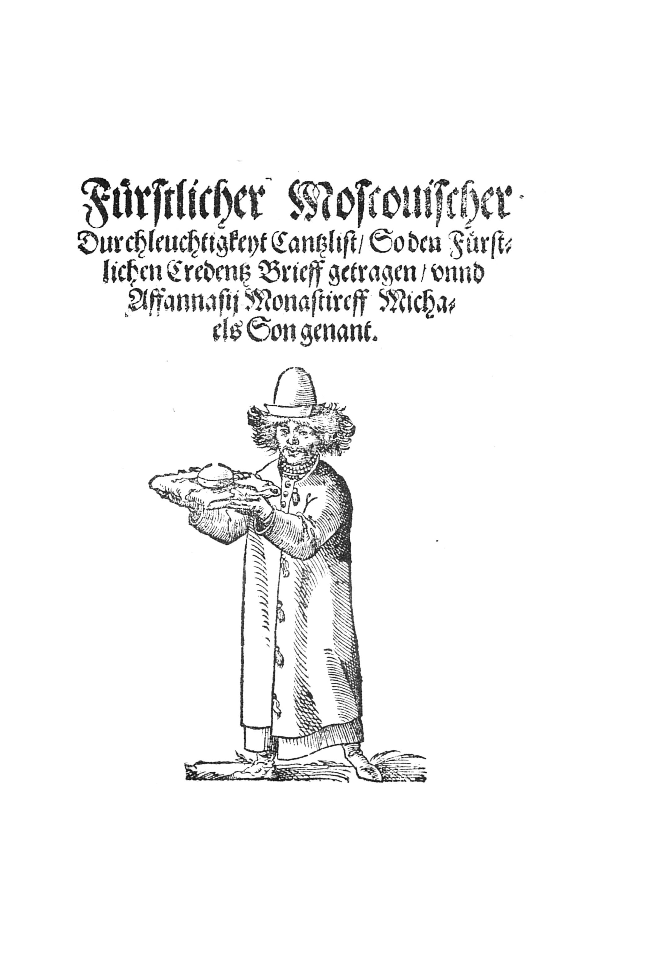 «Русское посольство к императору Священной Римской империи Максимилиану II в Регенсбурге» — западноевропейская раскрашенная гравюра (ксилография) 1576 года. Достоверные портреты московских государей Ивана III, Василия Ивановича и Ивана IV. Ровинский Д. 1882 г.